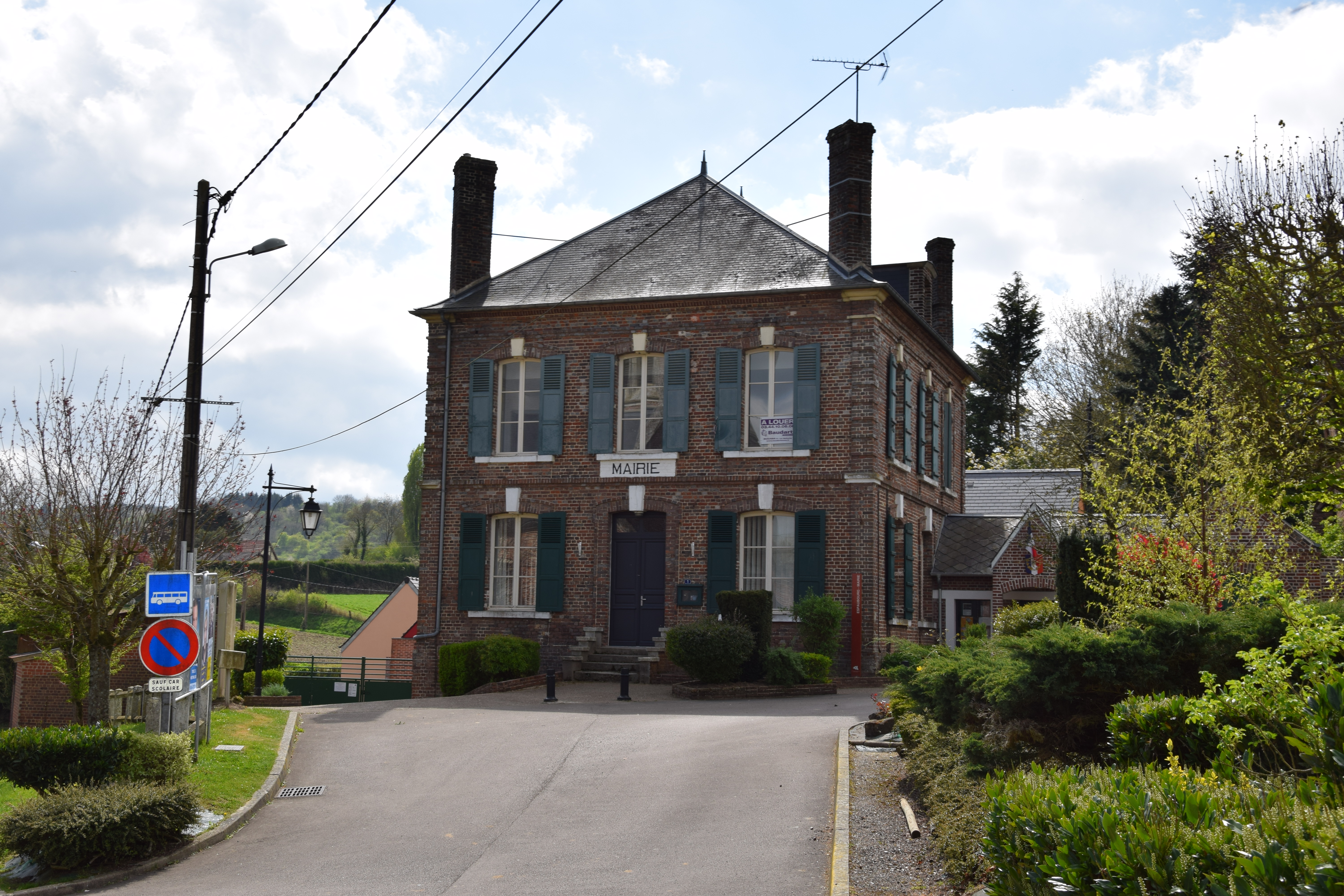 Espaubourg